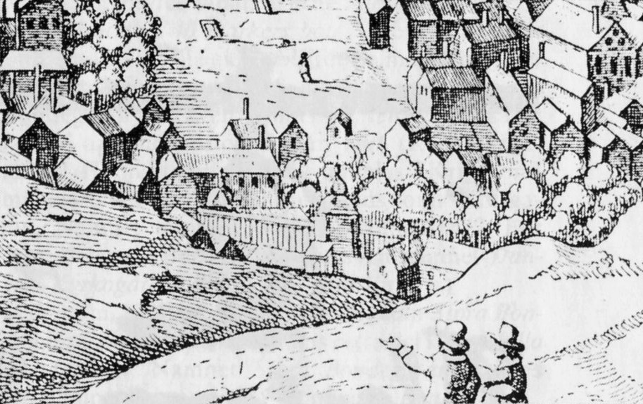 Björngården vid Björngårdsgatan, Södermalm, Stockholm